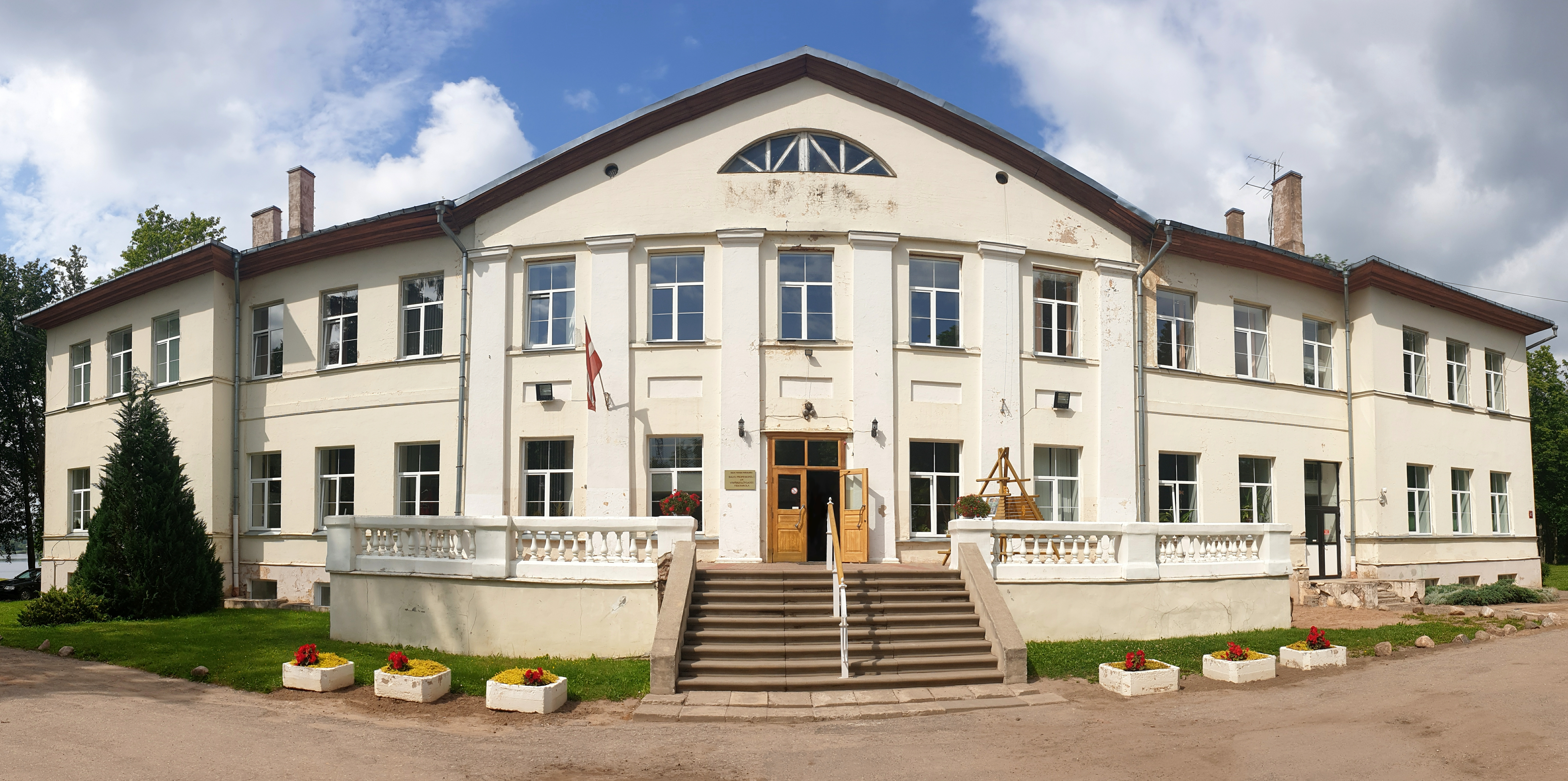 Balvi mõisa peahoone 2019. aastal.jpg